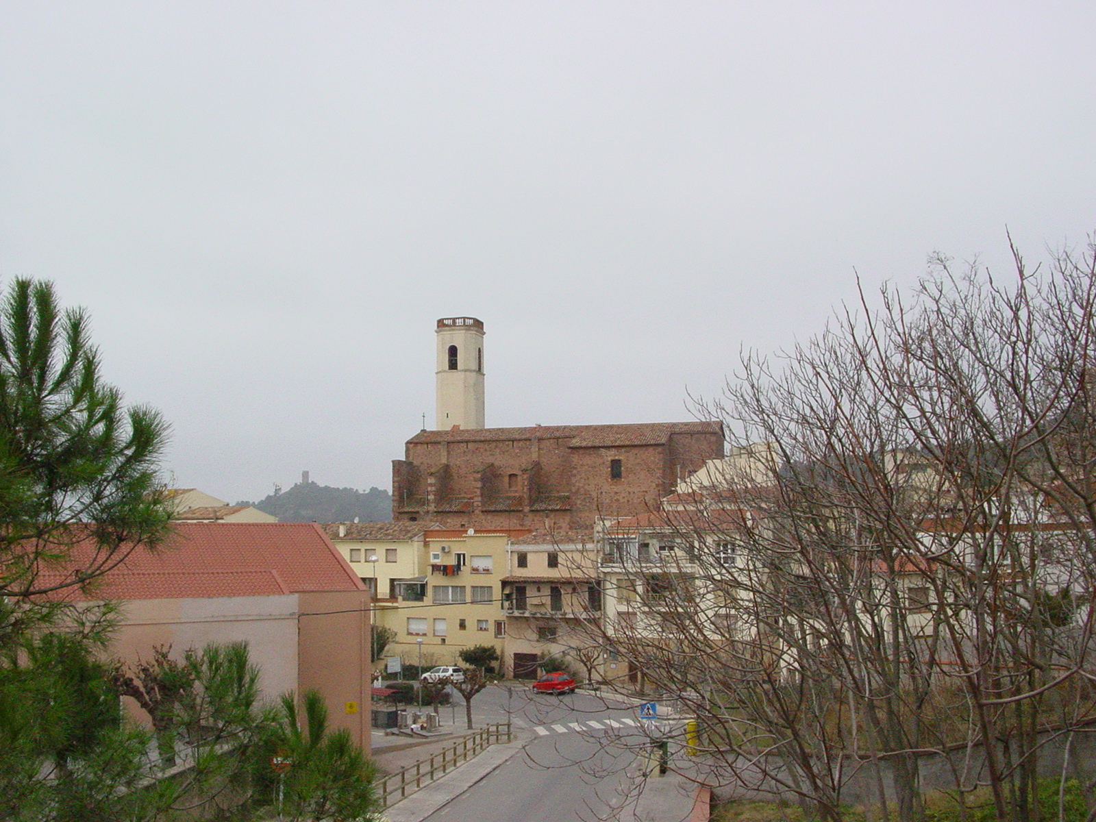 Vista general de Vacarisses